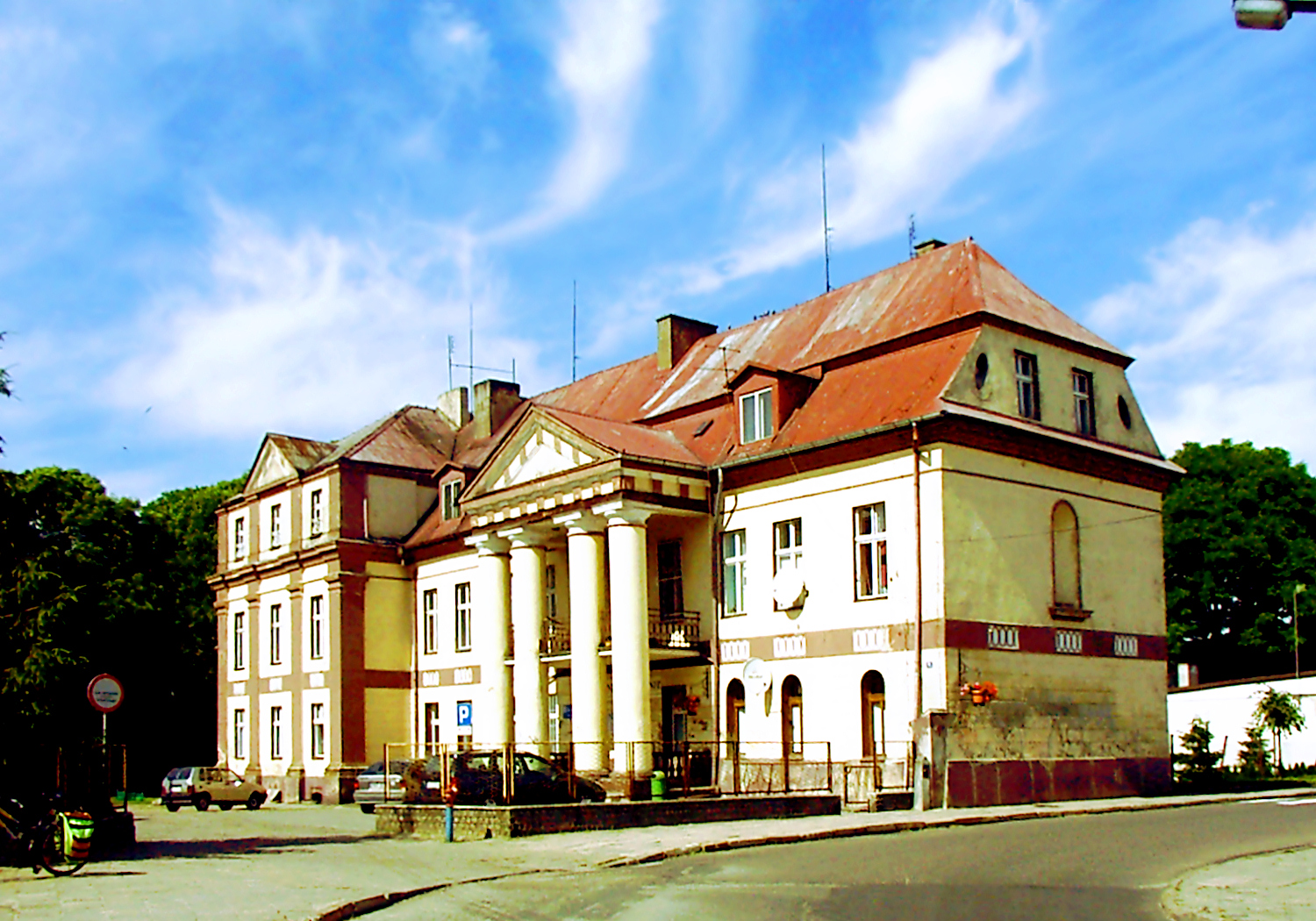 Lwówek, pałac z 1728 (Lwówek, palace)